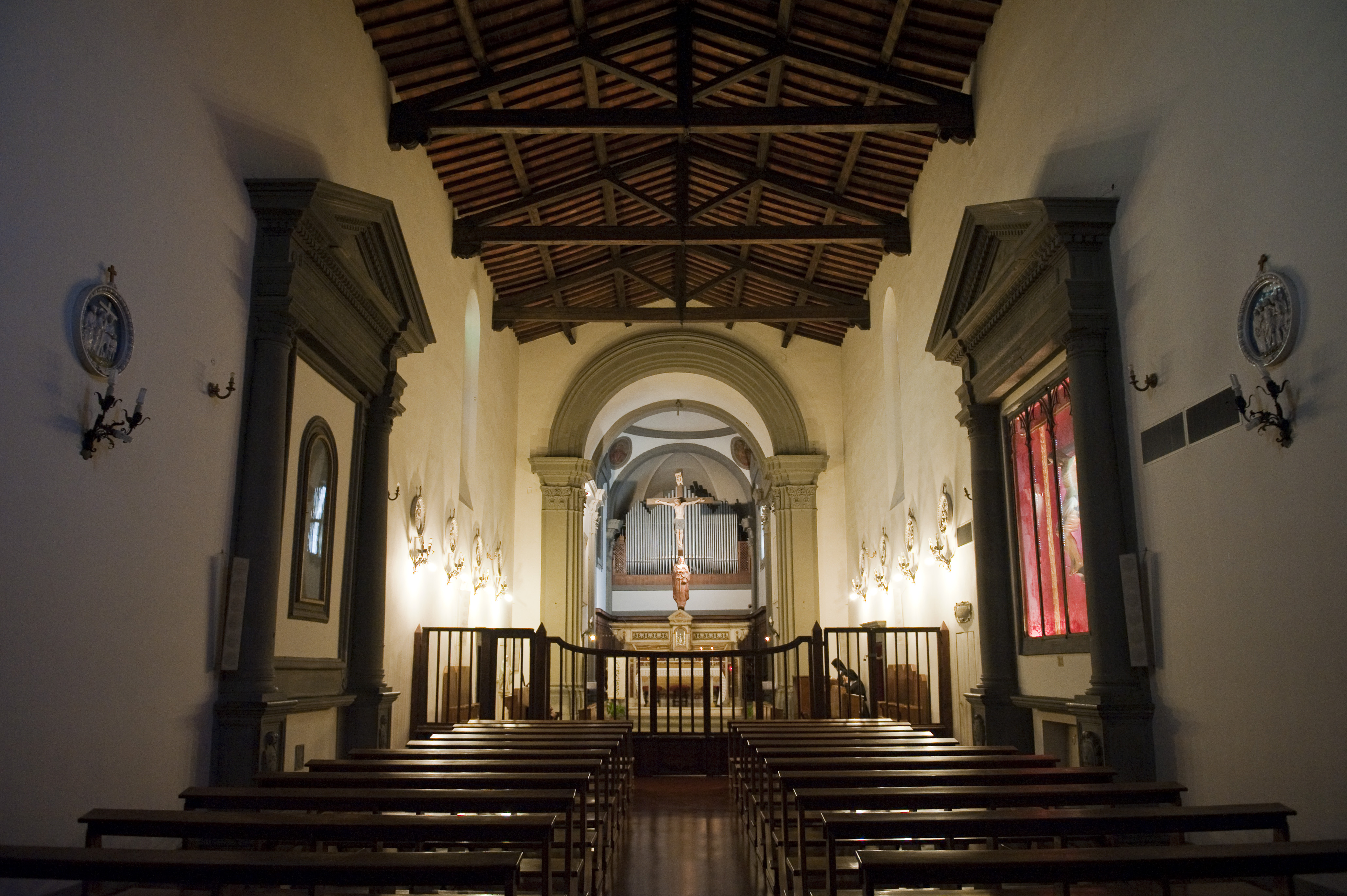 Interno del convento di San Francesco - San Casciano in Val di Pesa